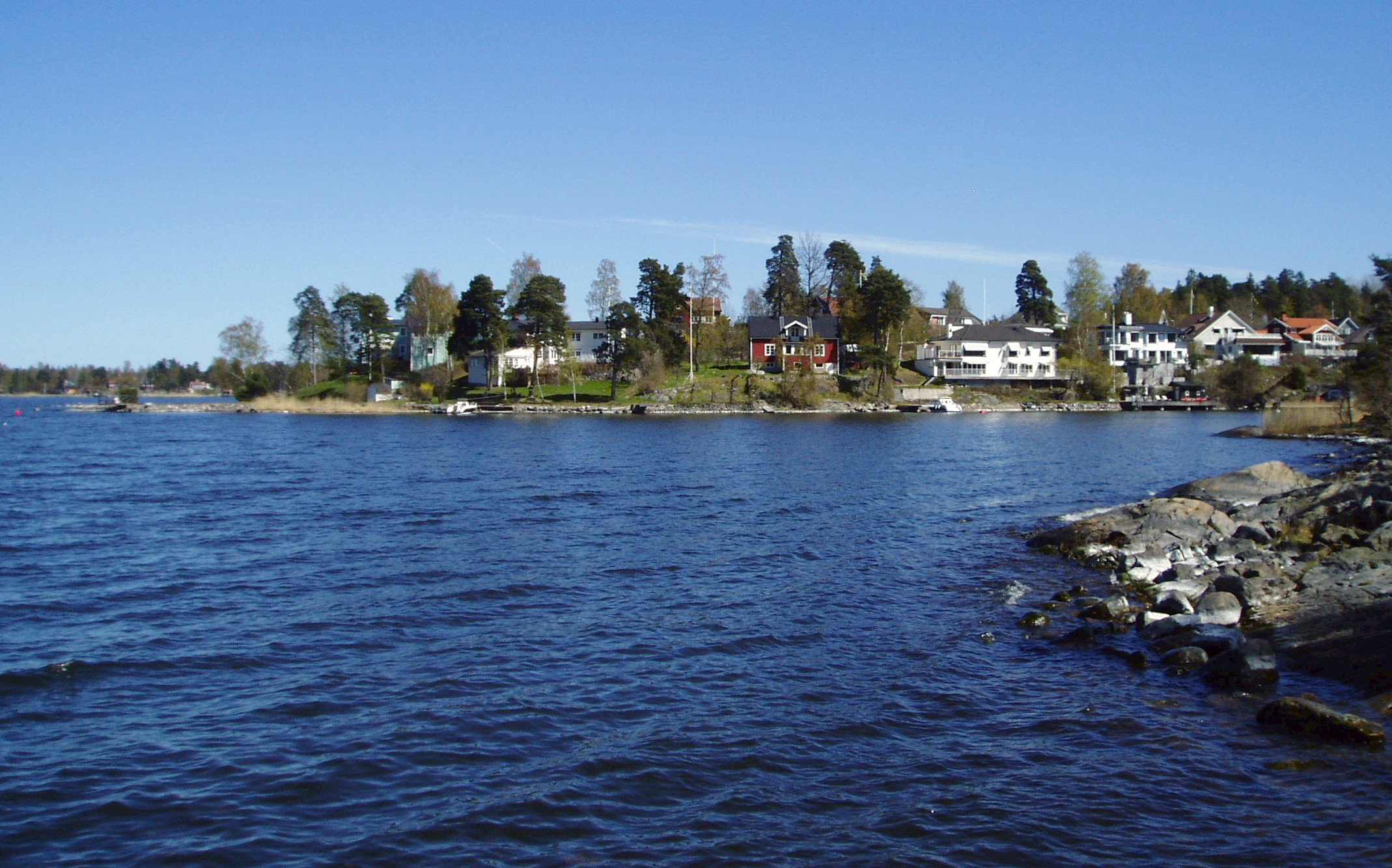 Kyttlinge på Lidingö